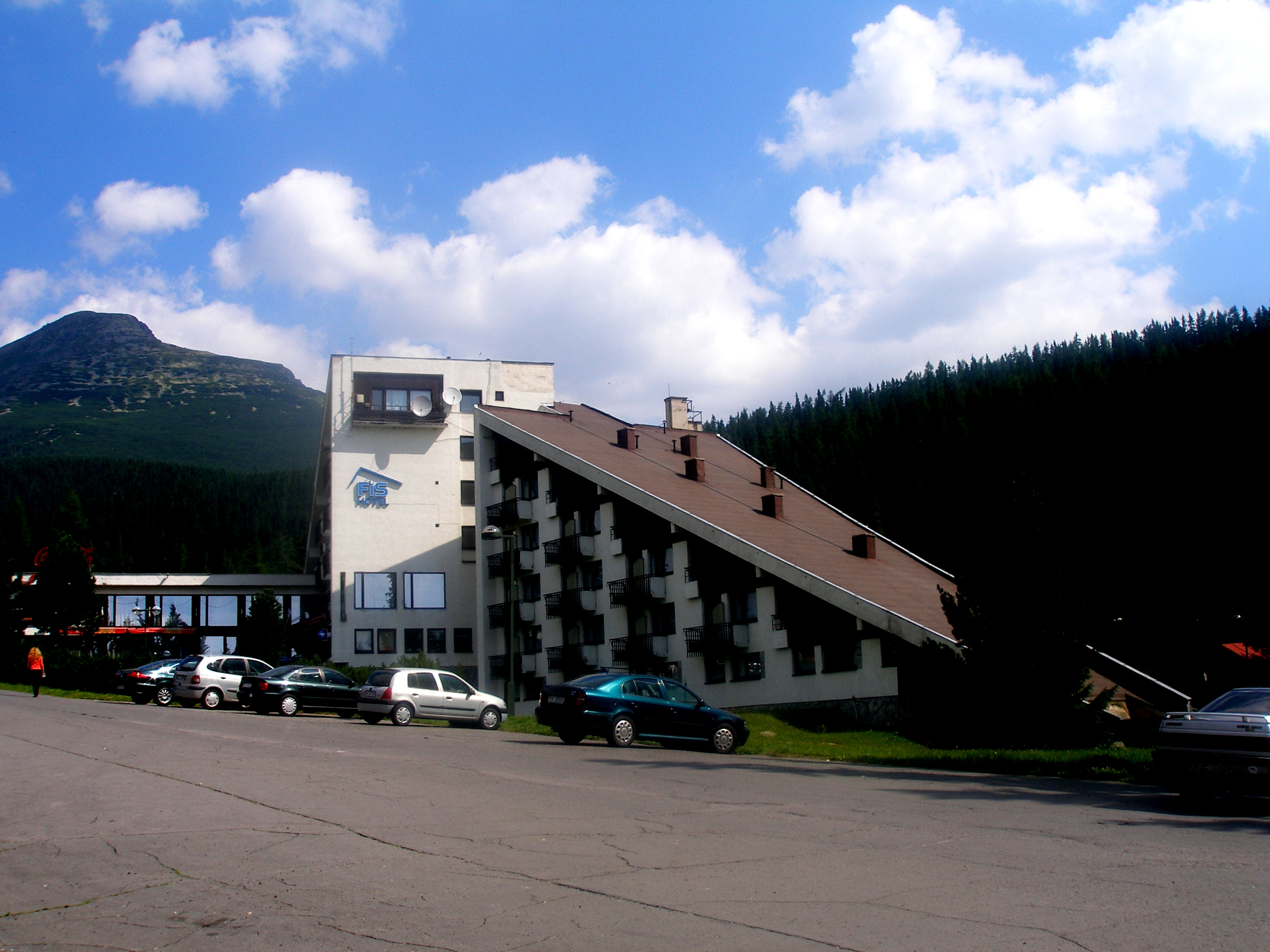 Hotel FIS, Štrbské Pleso